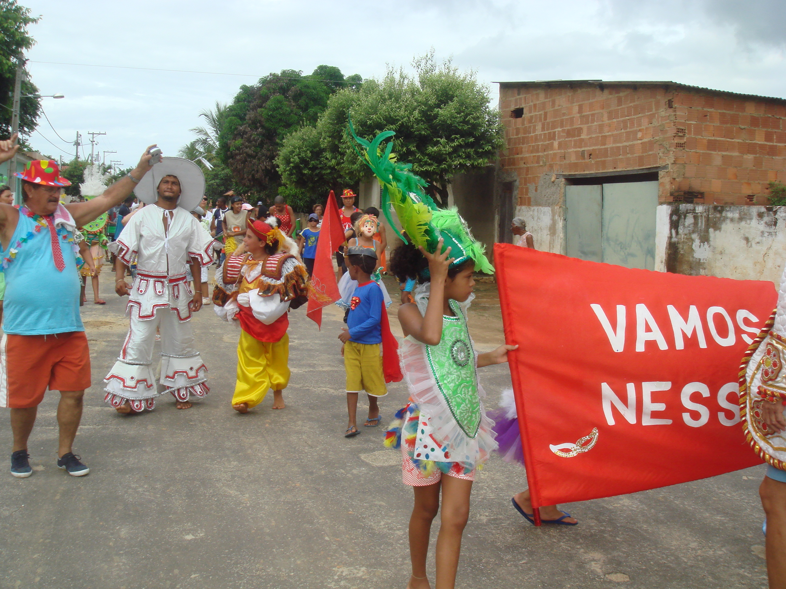 Bloco Vamos Nessa desfilando nas Ruas de Três Irmãos